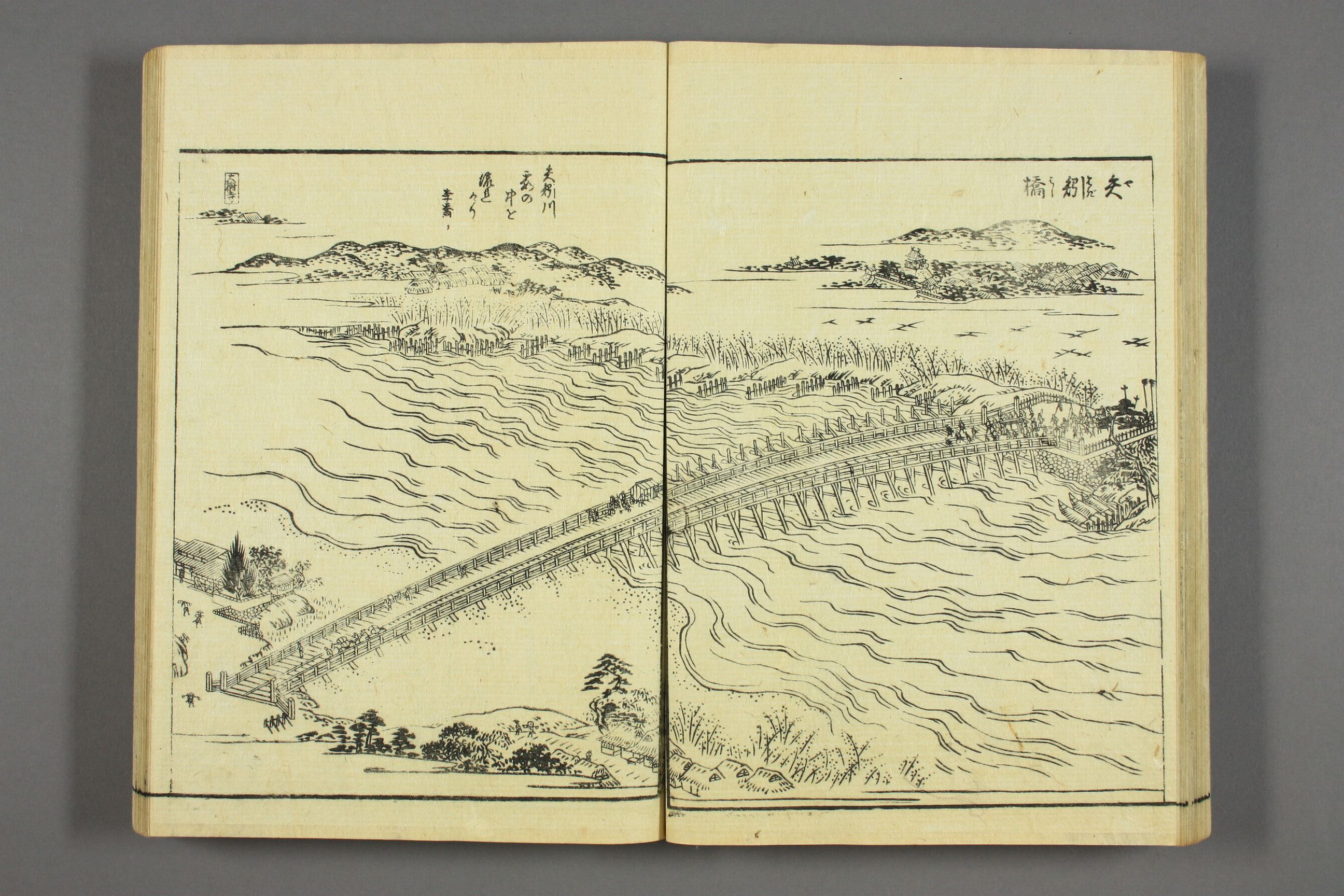 Tokaido meisho zue - 1797 - vol 3 p 36